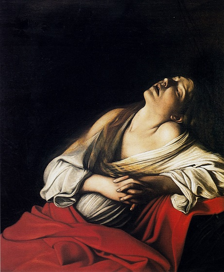 "Maddalena in estasi", olio su tela, collezione privata, Roma